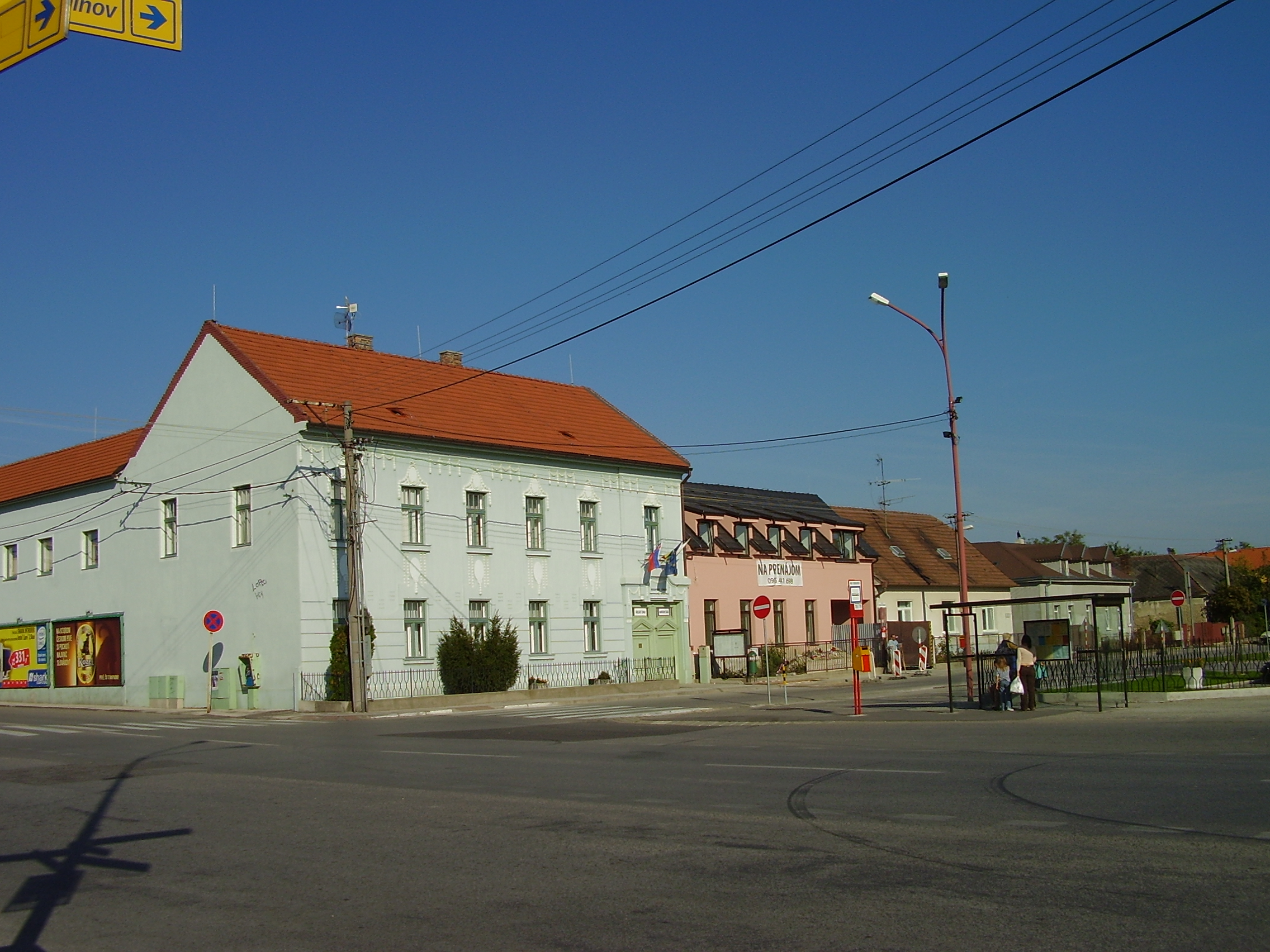 Bratislava